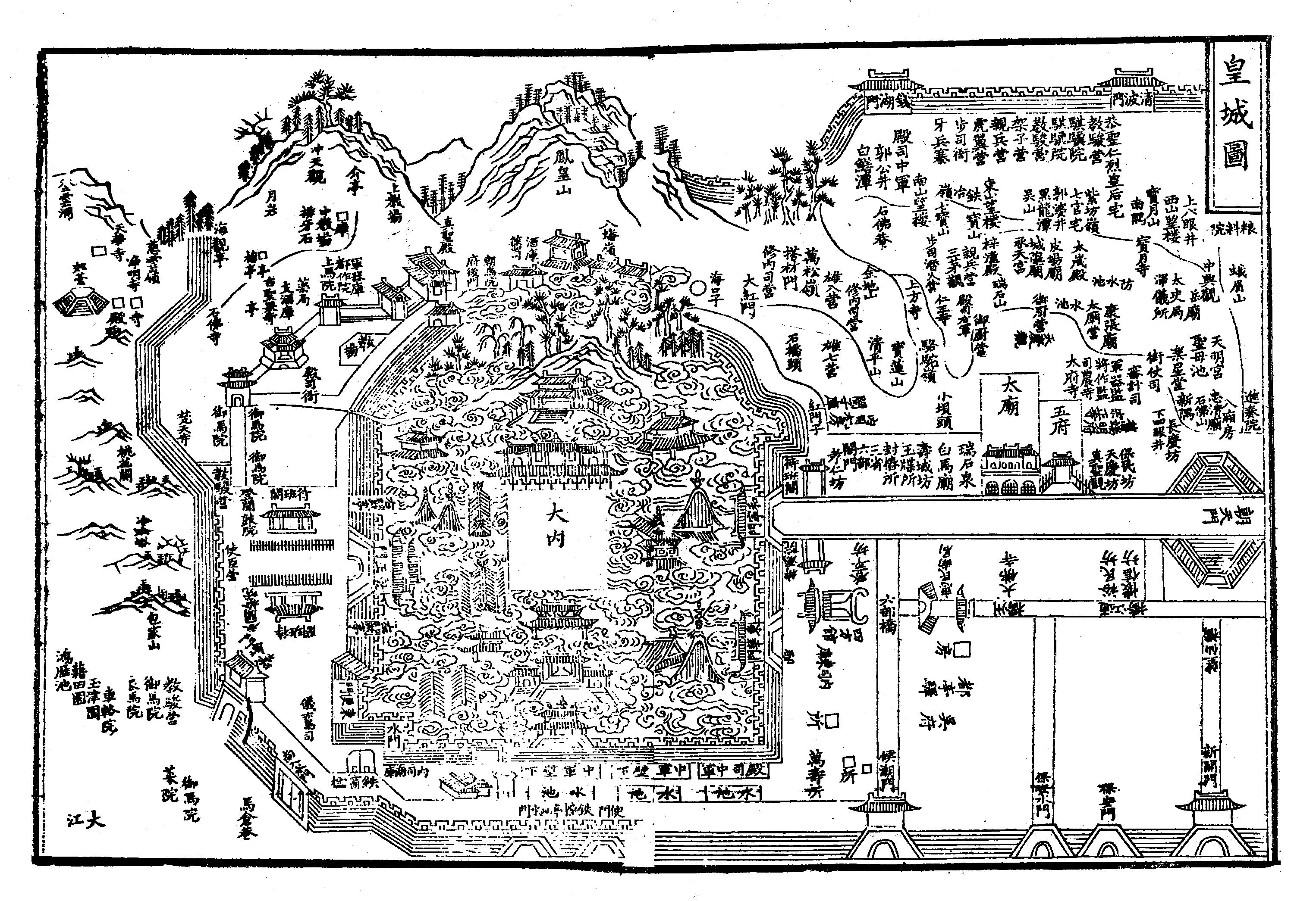 南宋杭州皇宫图，扫描自《咸淳临安志》。